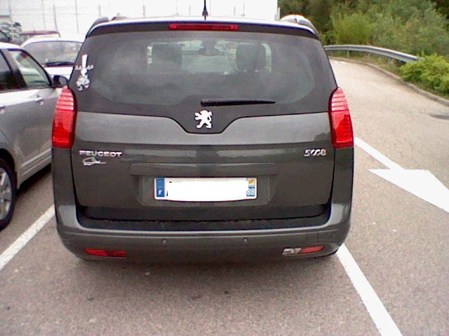 Peugeot 500/8